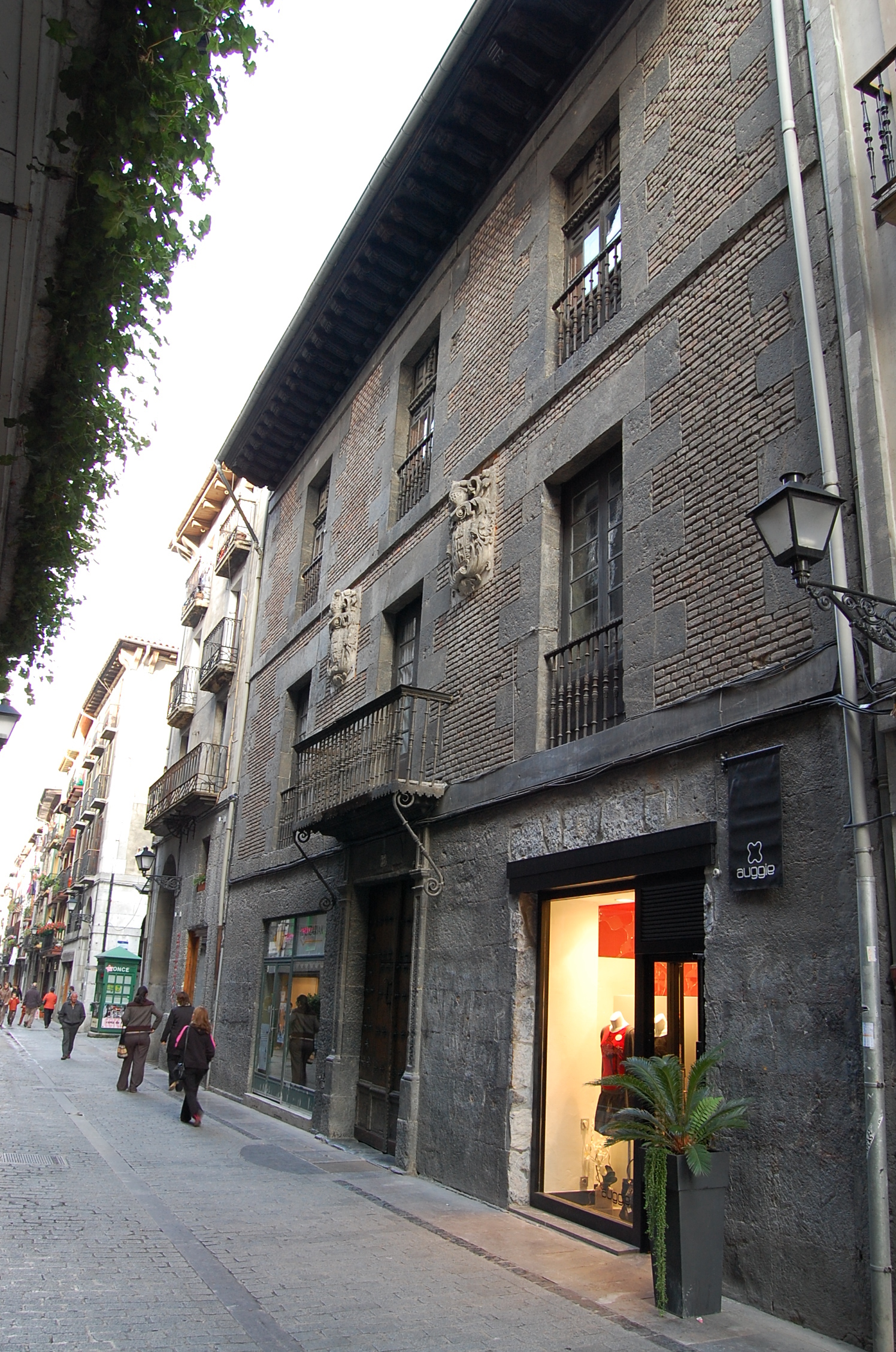 Tolosako Iturriza jauregia. Gipuzkoa, Euskal Herria.